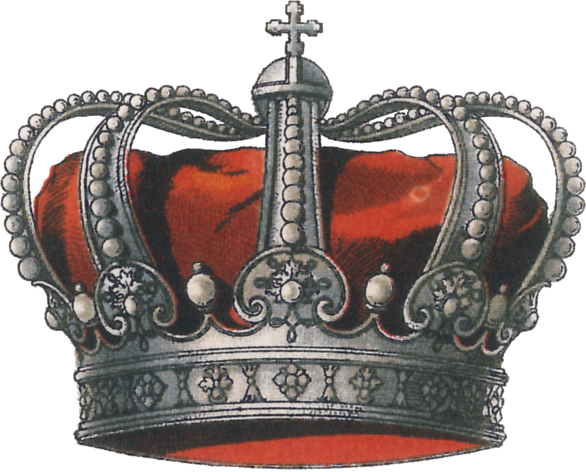 Fig. 15. Sog. stählerne Krone des Königreichs Rumänien